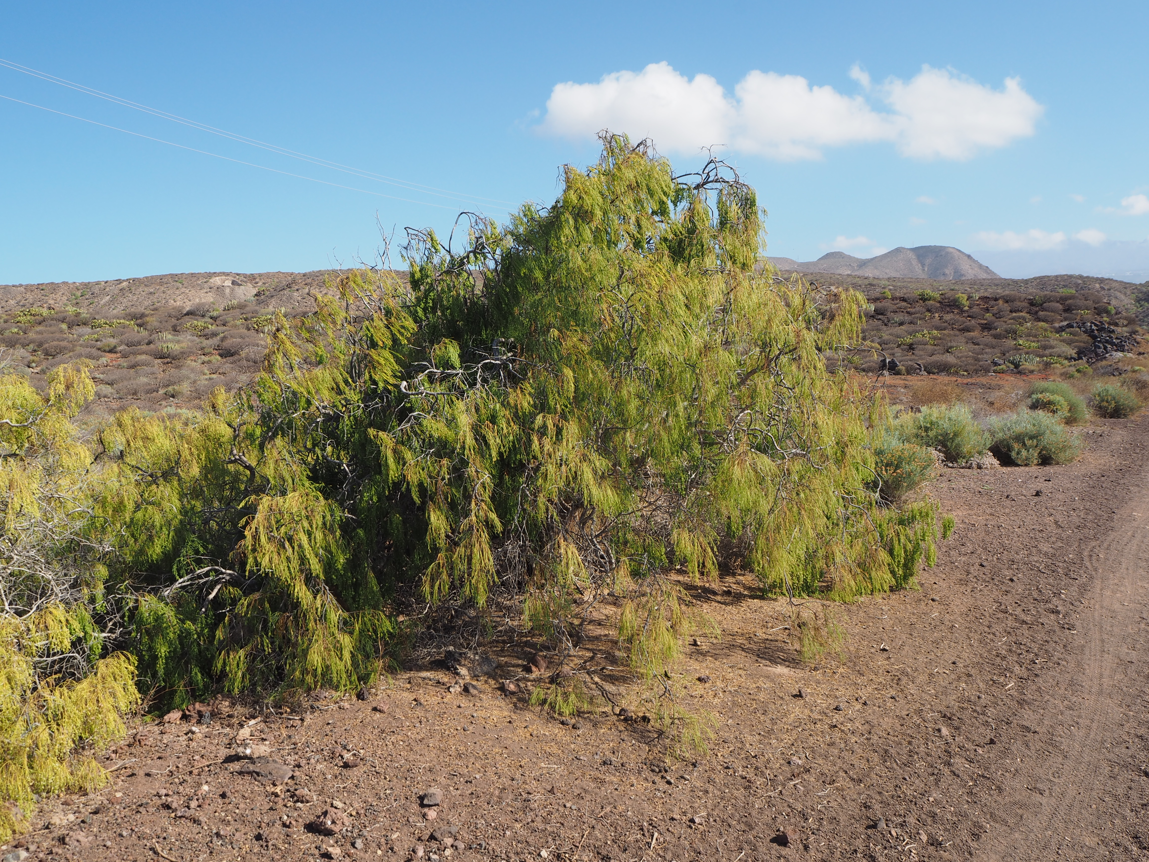 Plocama pendula (Balo). Malpaís de La Rasca, Tenerife.